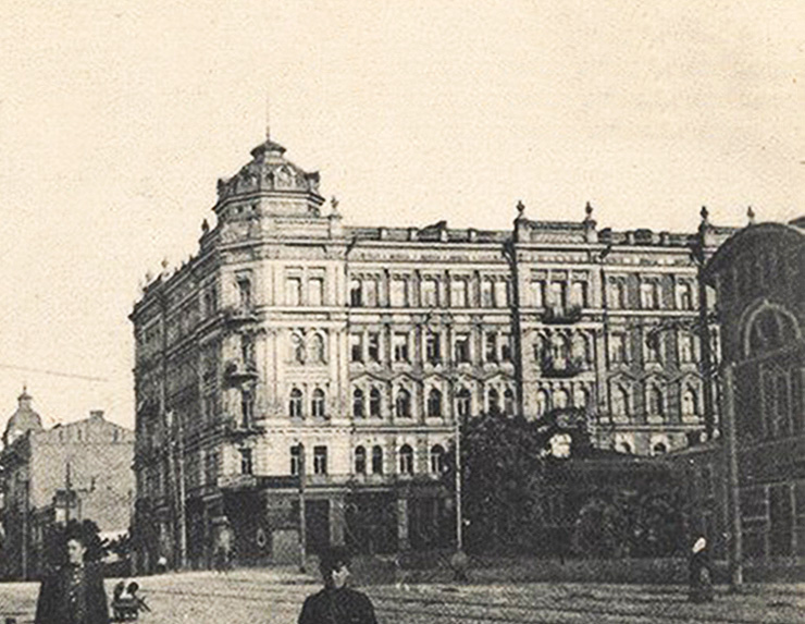 Жилий будинок, Київ, вул. Б. Хмельницького, 30/10